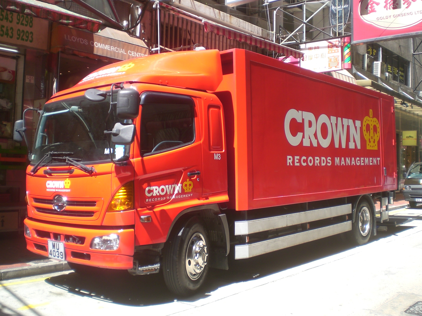 香港島上環永樂街，嘉柏有限公司（Crown Worldwide Group）載貨汽車